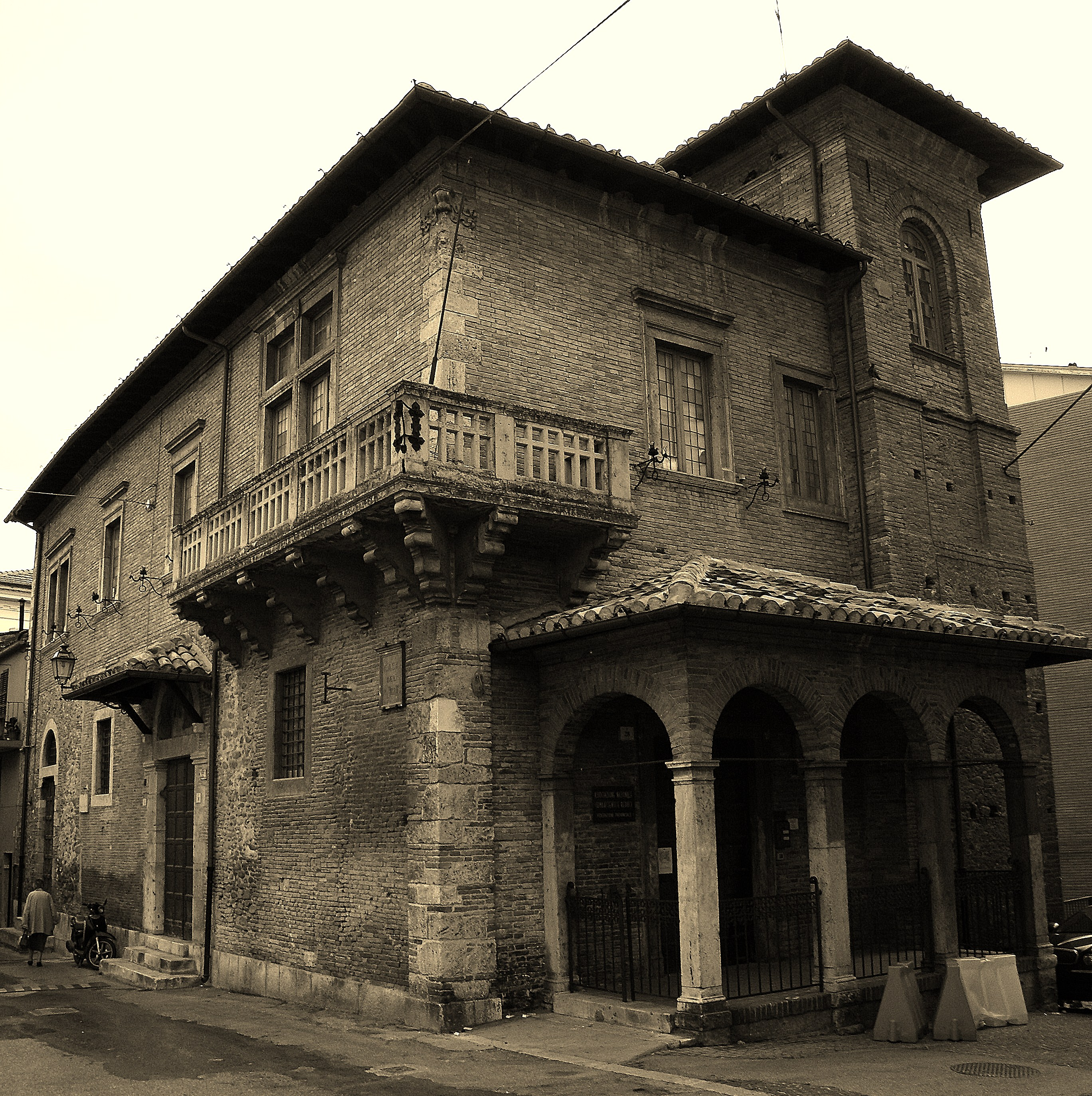 Casa del Mutilato, ex Chiesa della Misericordia: costruita nel 1348 durante una epidemia di peste e restaurata nel 1400, non subì altre modifiche nel tempo. Si racconta che vi fosse conservata una spina della corona originale di Gesù sul crocifisso della chiesa.